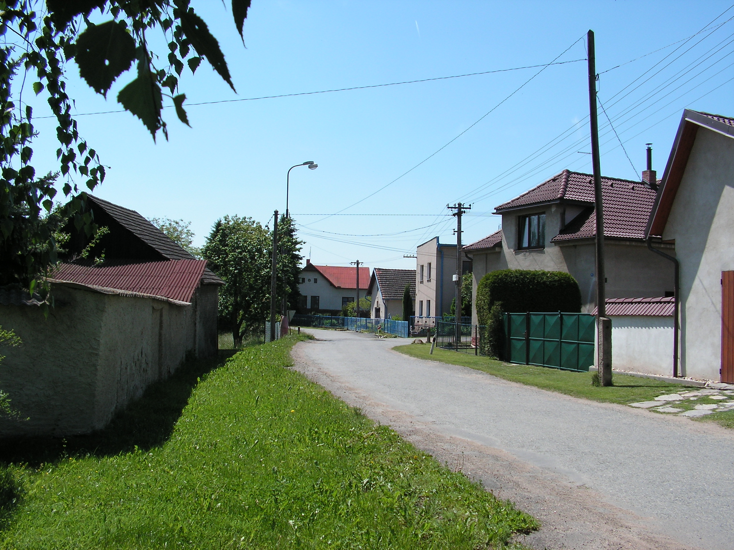 Obec Vodranty v okrese Kutná Hora.